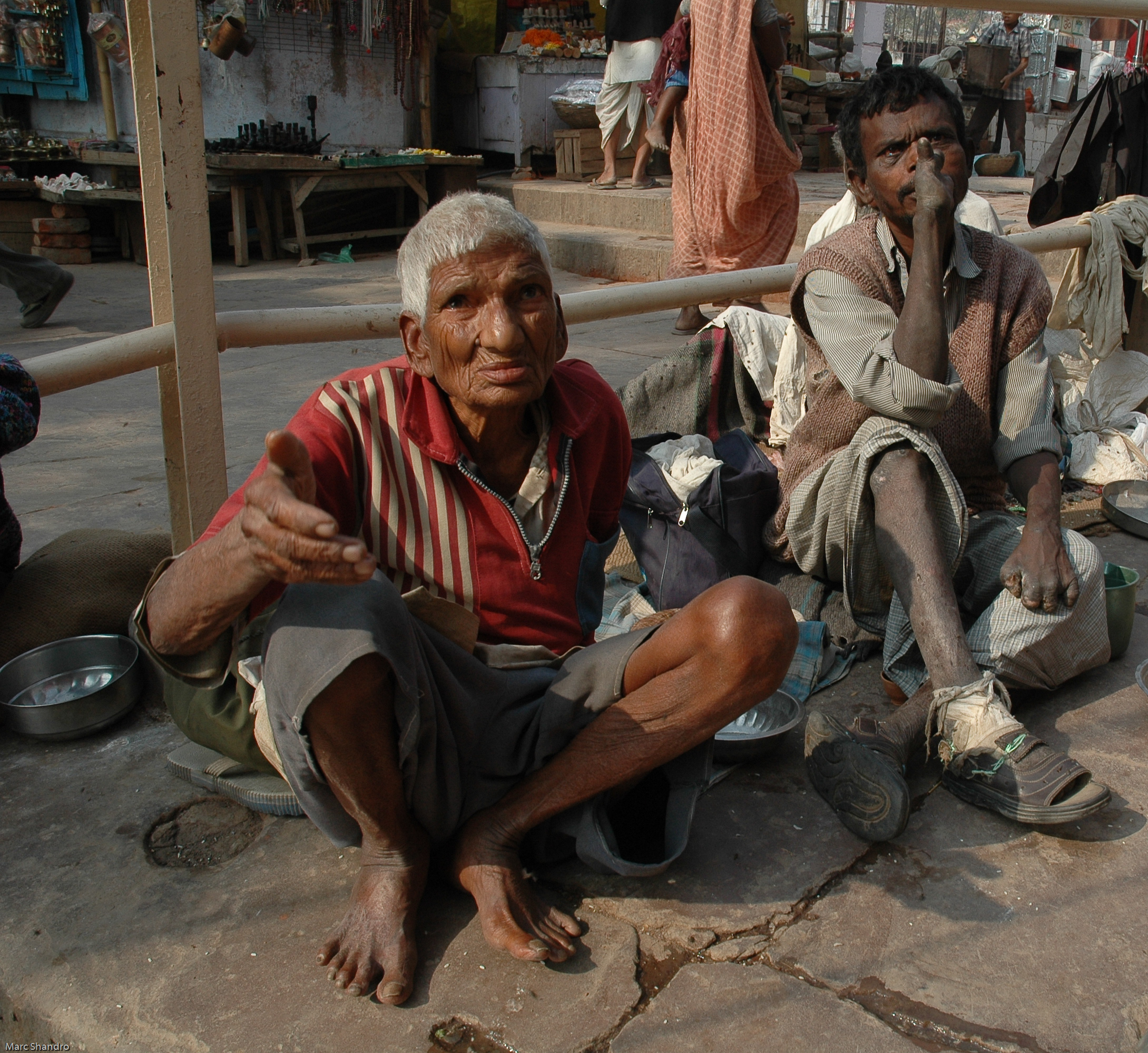 Beggars in Varanasi, IndiaBeggars in Varanasai